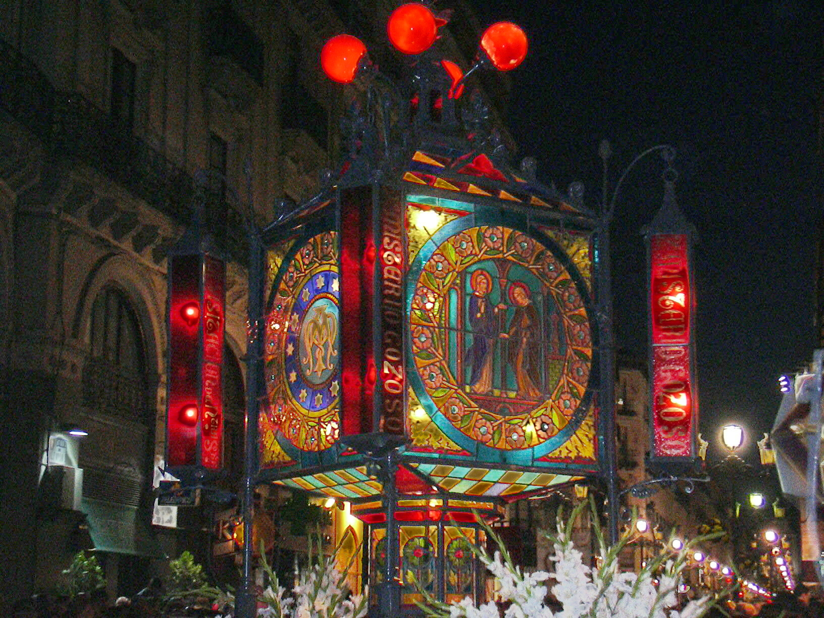 Rosario de Cristal - Fiestas del Pilar 2006 - Zaragoza (España)